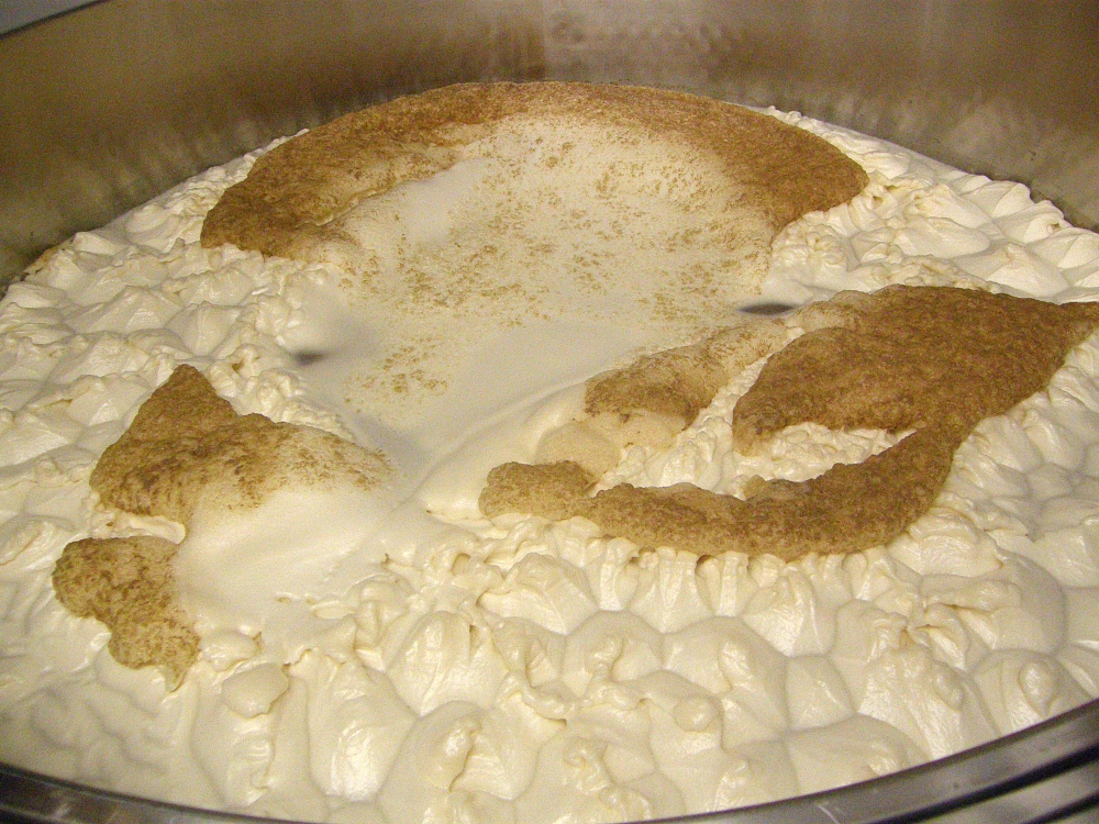 Stadium der hohen Kräusen während der Hauptgärung ist das intensivste Stadium der Gärphase, die Kräusen sind höher und grobblasiger als je zuvor, die abgeschiedenen Hopfeninhaltsstoffe sind auf der Kräusendecke zu sehen. Brauerei HBX in Hannover